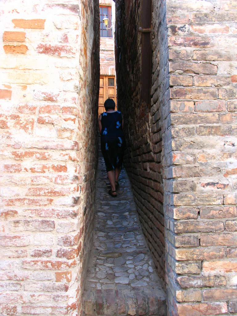 il vicolo più stretto d'italia, Donna, the narrowest alley in Italy - cm. 43 wide Ripatransone, Marche, Italia